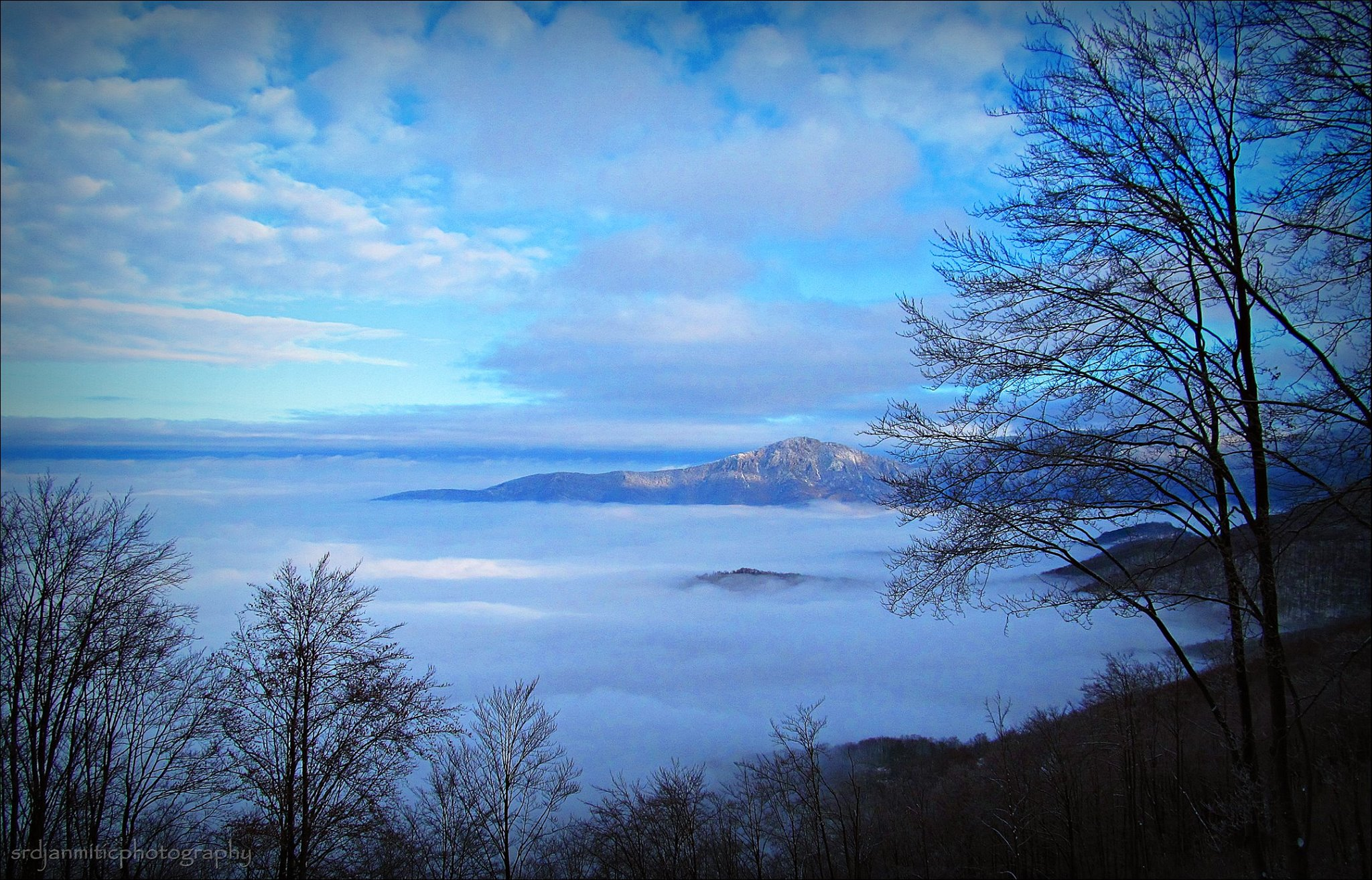 Srpski (latinica): Pogled sa Suve planine na oblacima prekrivenu Belopalančku kotlinu, Srbija